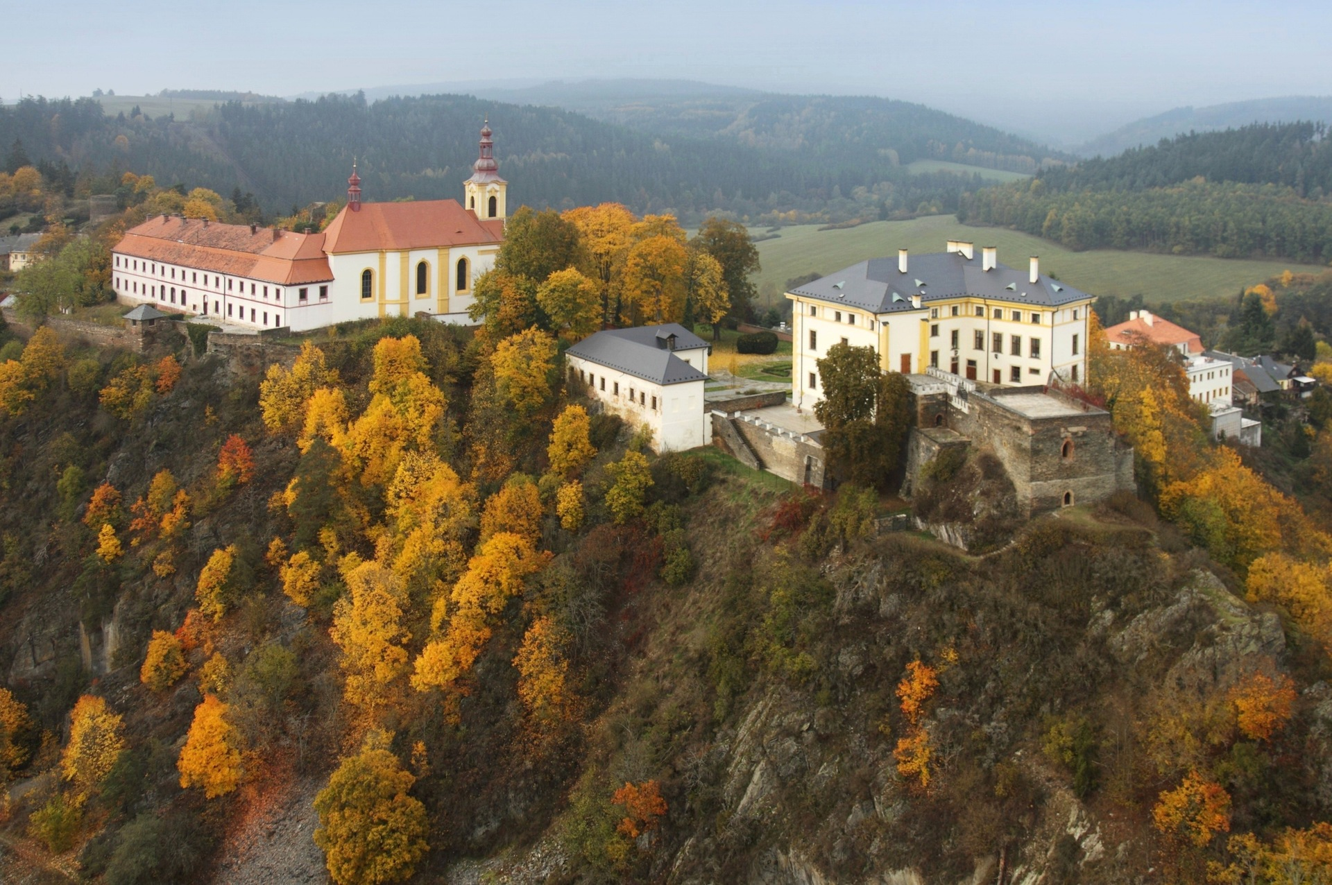 Pohled z nebe na Rabštejn nad Střelou